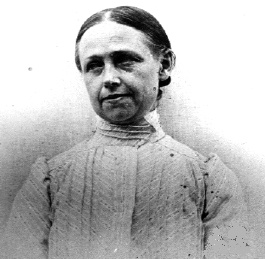 Isabelle Rimbaud (1860-1917) — Sœur cadette d'Arthur Rimbaud